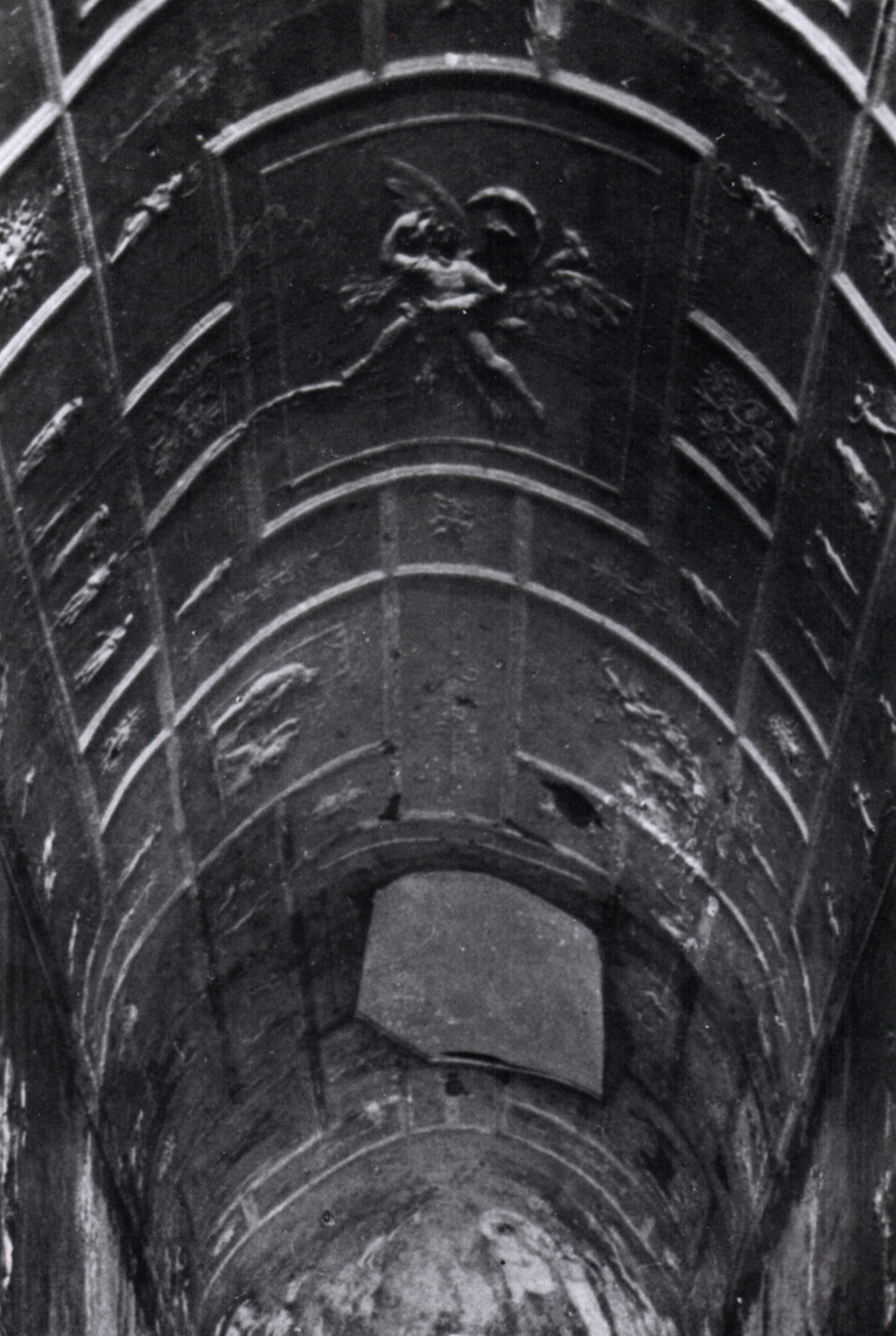 Descrizione: vedi titolo Fonte: Ranuccio Banchi Bandinelli e Mario Torelli, L'arte dell'antichità classica, Etruria-Roma, Utet, Torino 1976. Categoria:Immagini d'arte romana